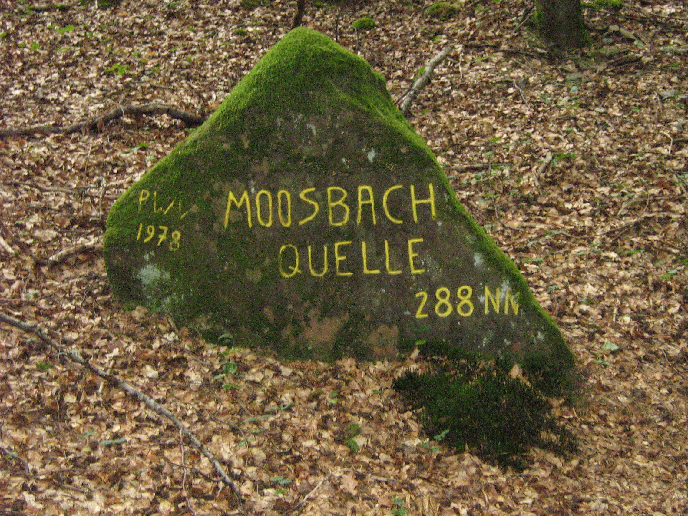 Ritterstein 205, Moosbach Quelle